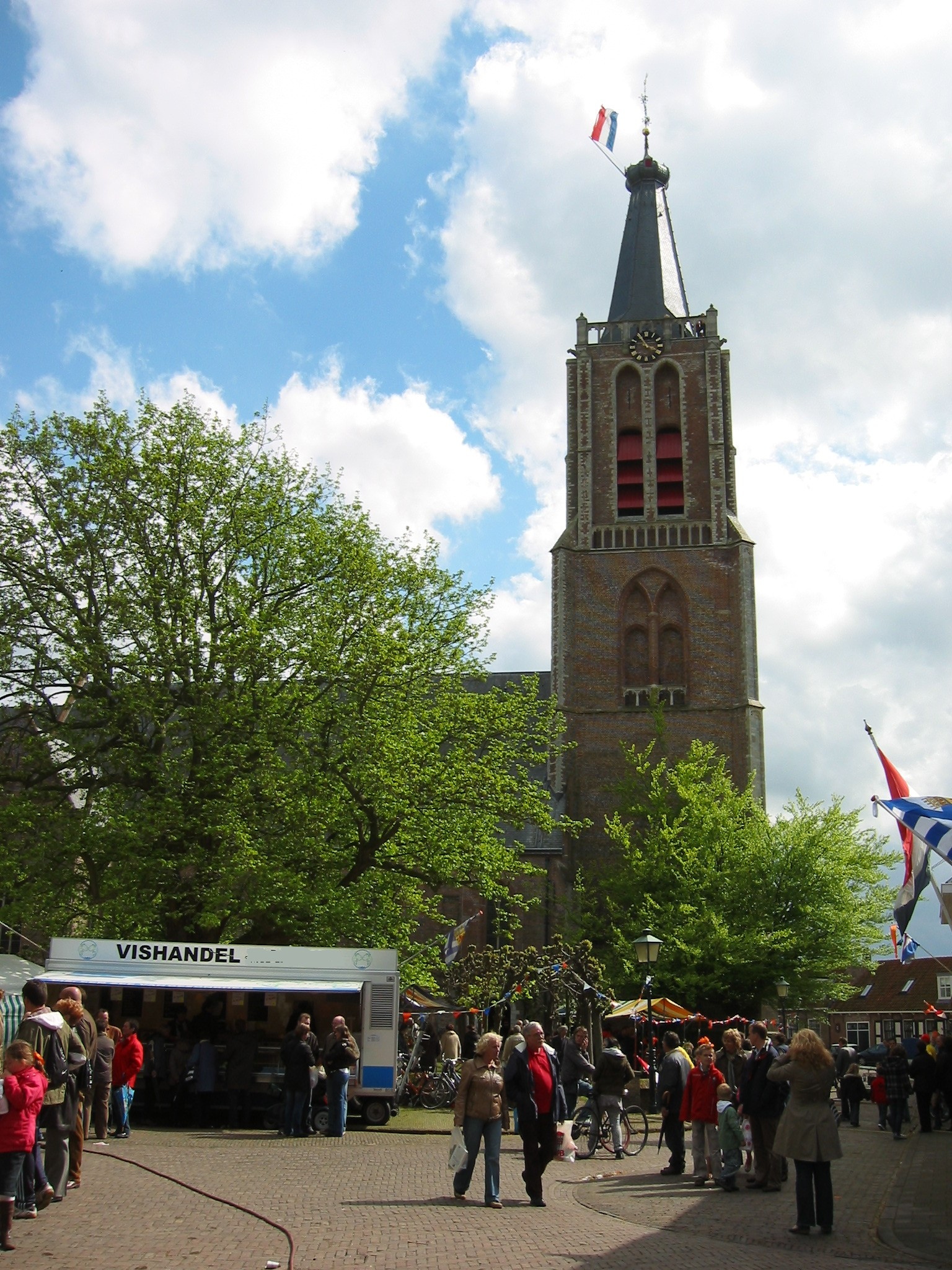 Geerteskerk (Geertes church), Kloetinge, NL